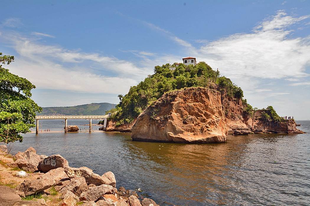 Ilha da boa Biagem in der Guanabara Bucht bei Niteroi, Brasilien